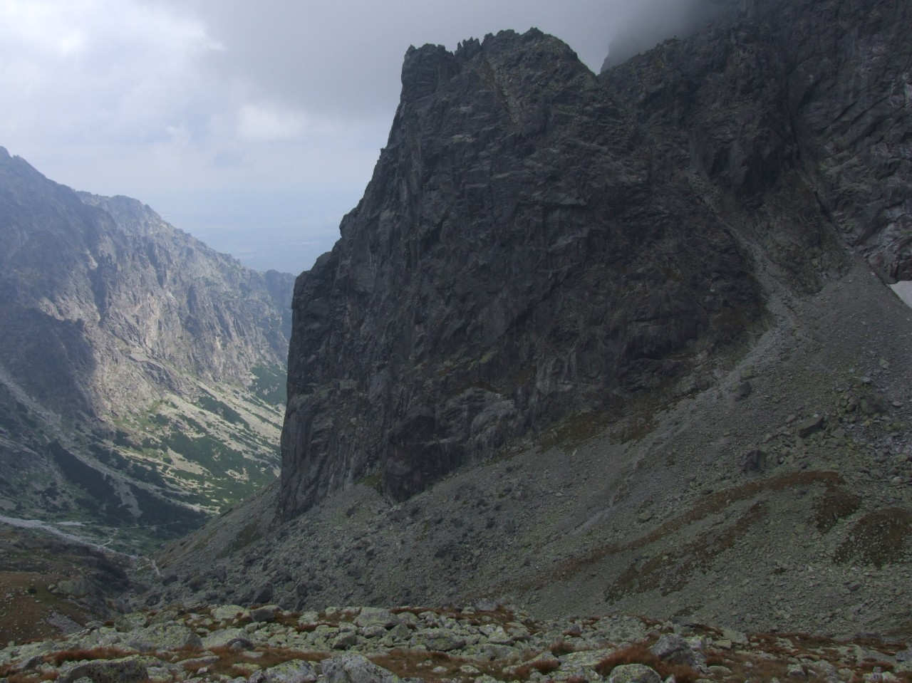 Żółta Ściana. Widok z Dolinki Lodowej